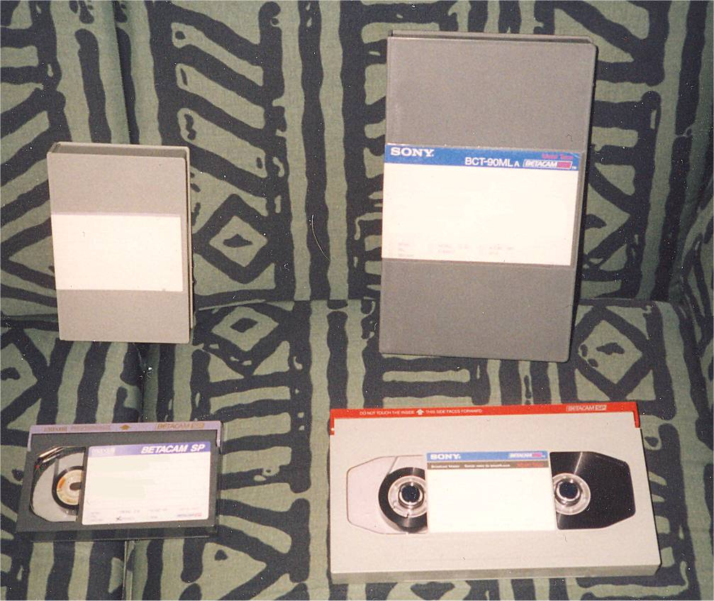 Kuva: Broken Halonen Productions